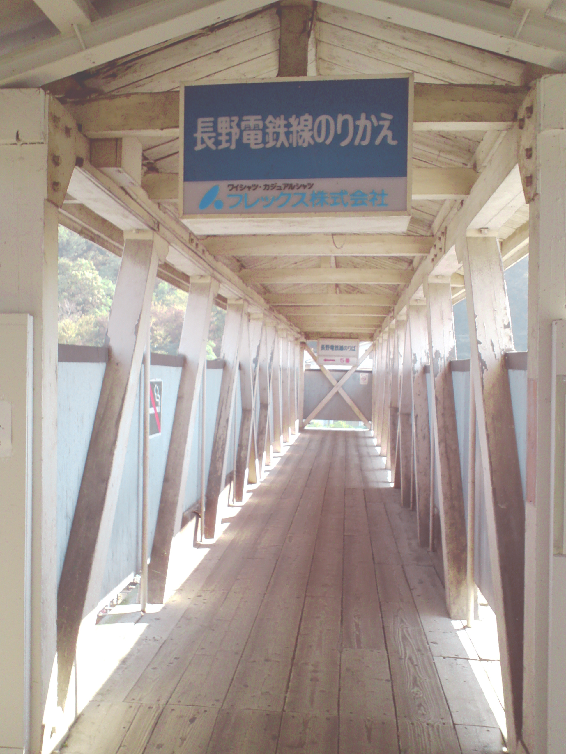 屋代駅、しなの鉄道と長野電鉄線の乗り換え連絡通路